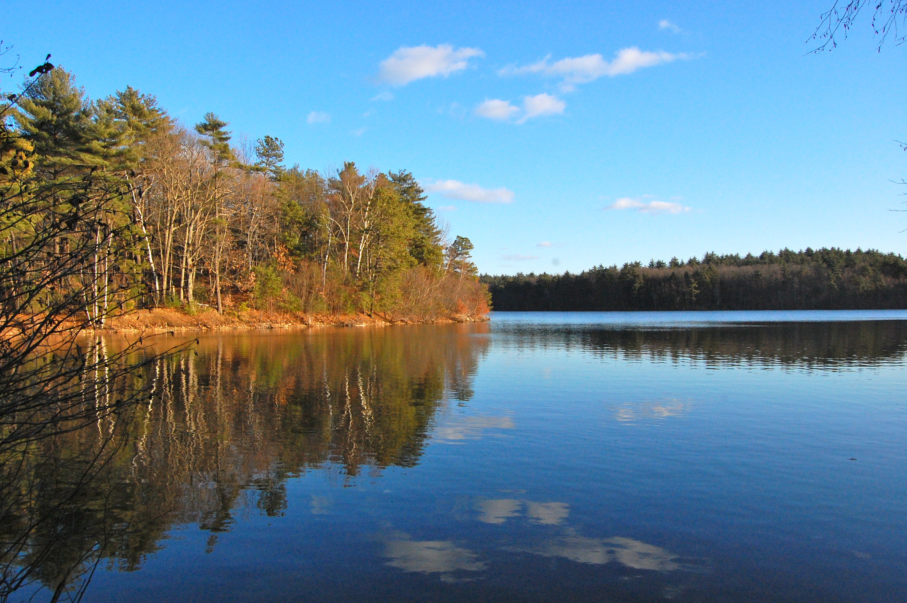 Walden.